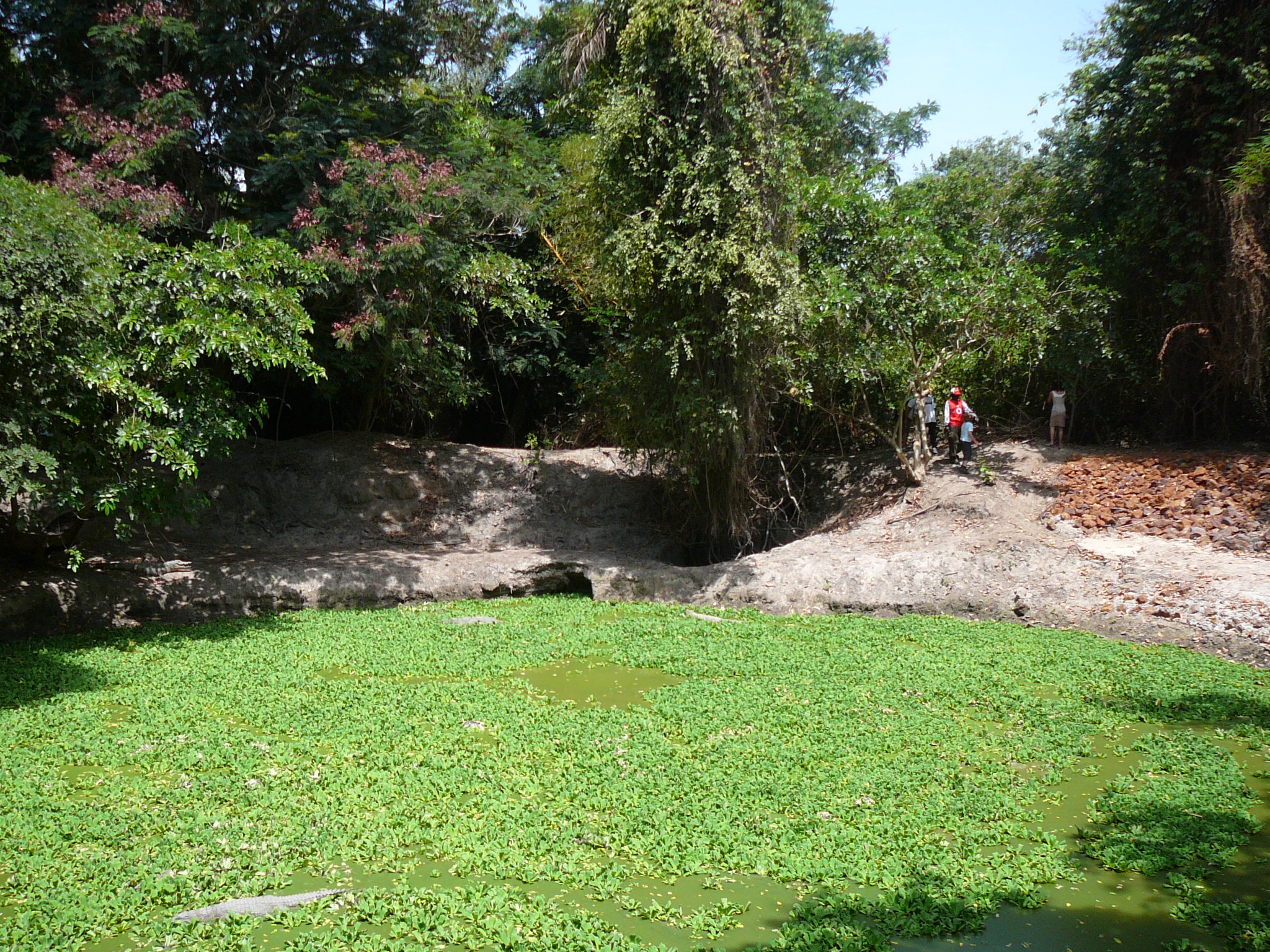 Das Heilige Krokodilbecken von Kachikally, Bakau